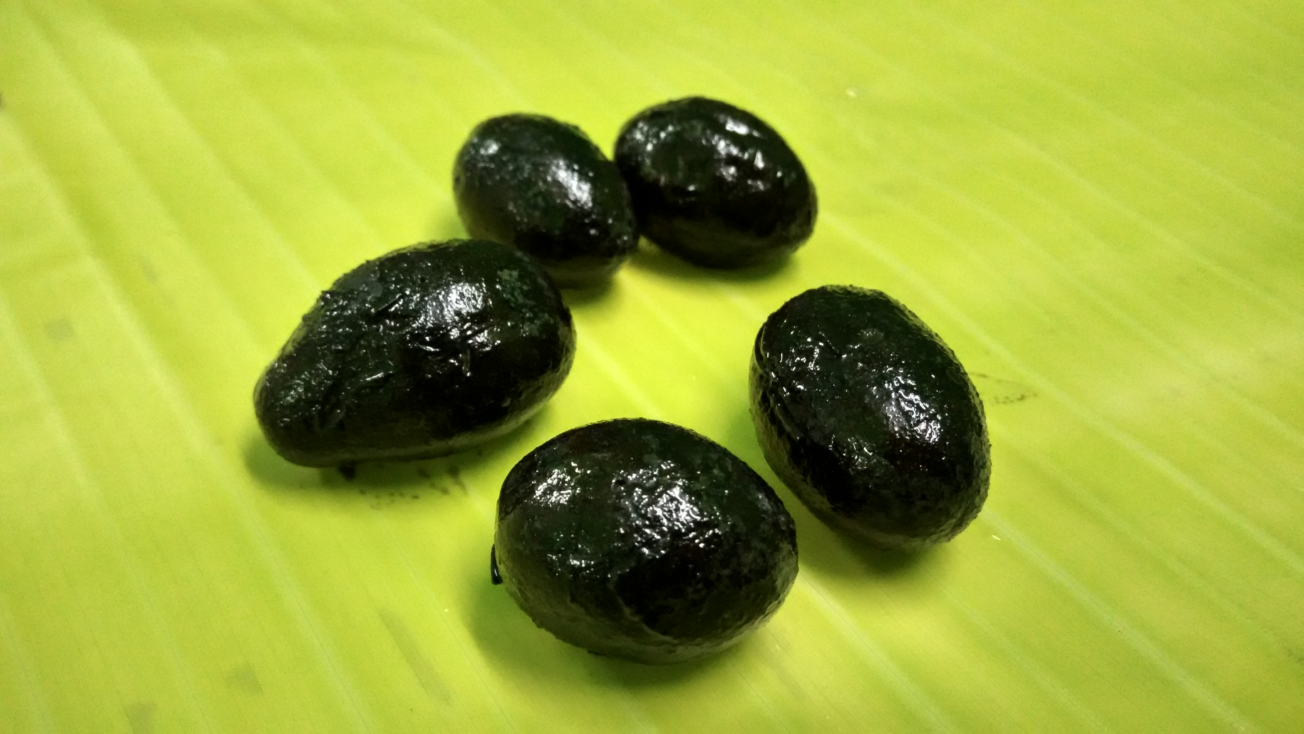 தேன் கடுக்காய்.